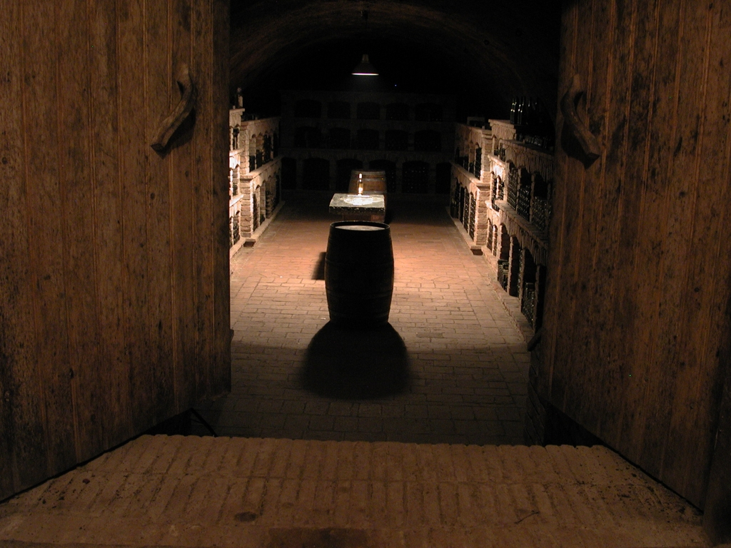 Weinkeller in Gols